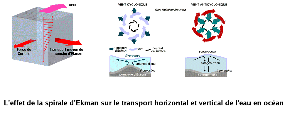 Transport horizontal et vertical de l'eau dans l'océan à cause de la force de Coriolis qui produit la Spirale d'Ekman. Dans une dépression, les vents tournant de façon anti-horaire, le force de Coriolis dévie l'eau vers l'extérieur ce qui crée un déficit au centre du système et un Pompage vertical. L'inverse se produit dans le cas d'un anticyclone.